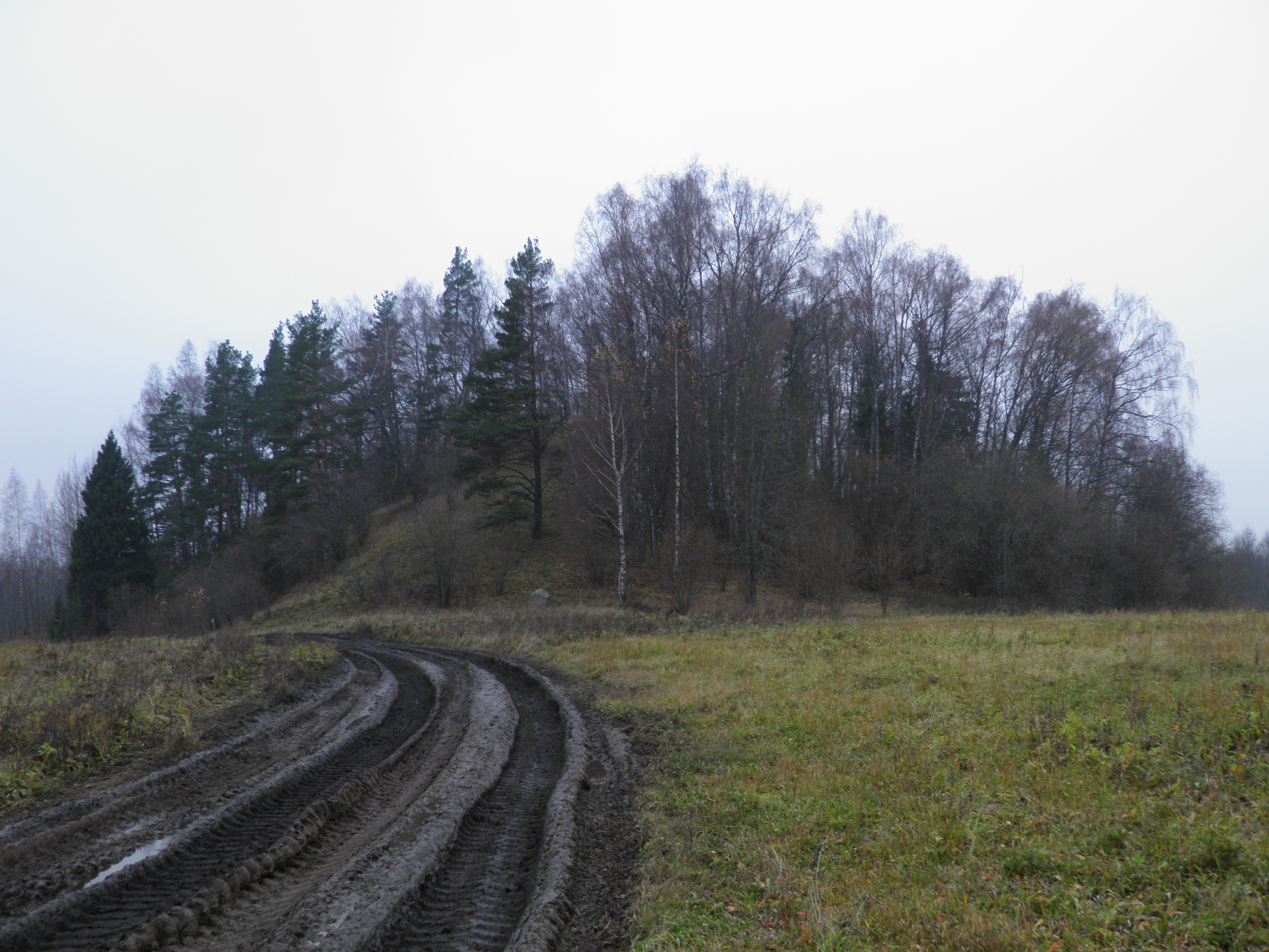 stupelu pilskalns